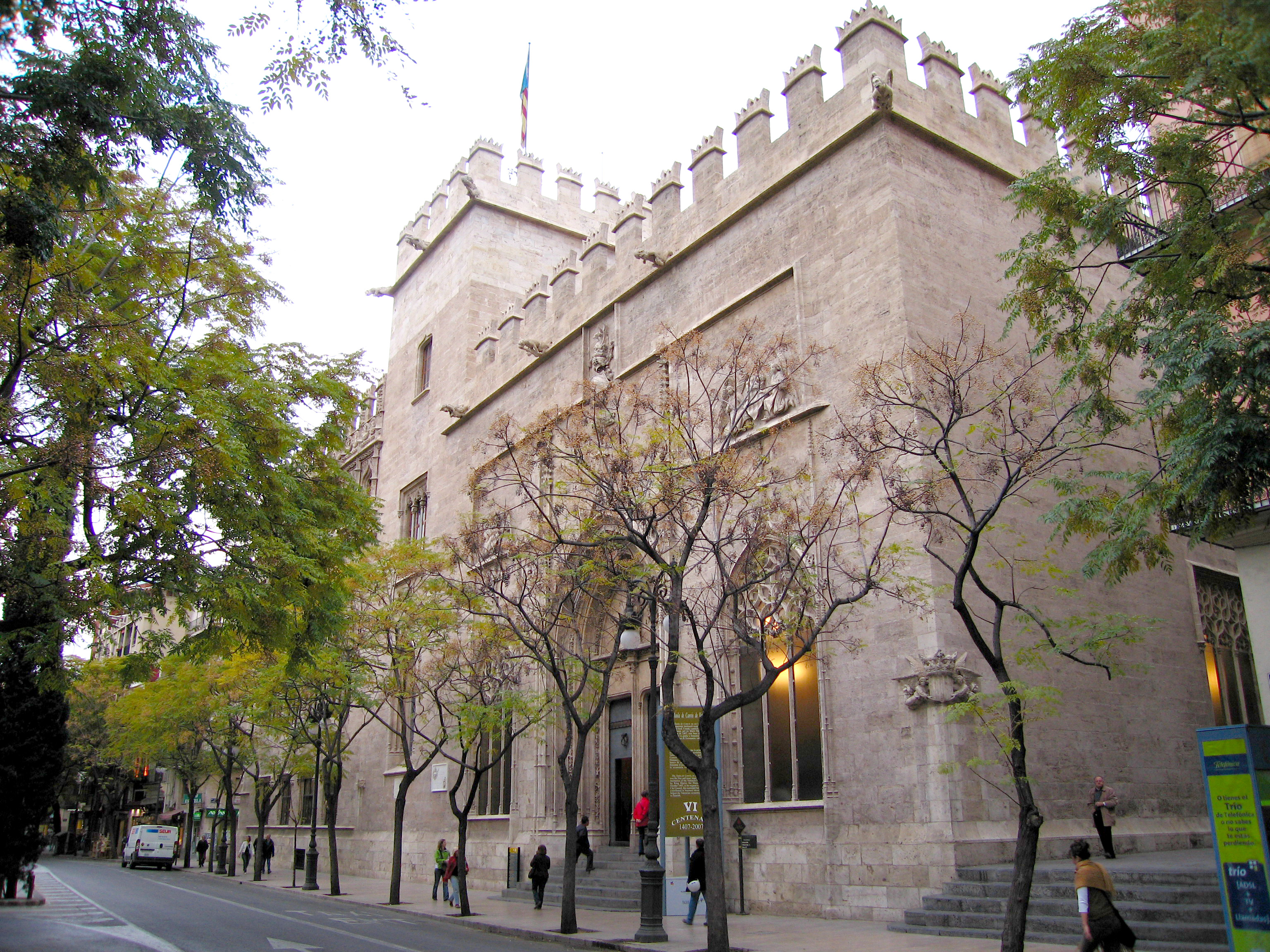 Vista de la Llotja des del Mercat Central, València. View of the Silk Exchange (Llotja de la Seda) from the Central Market (Mercat Central) in Valencia, Spain.